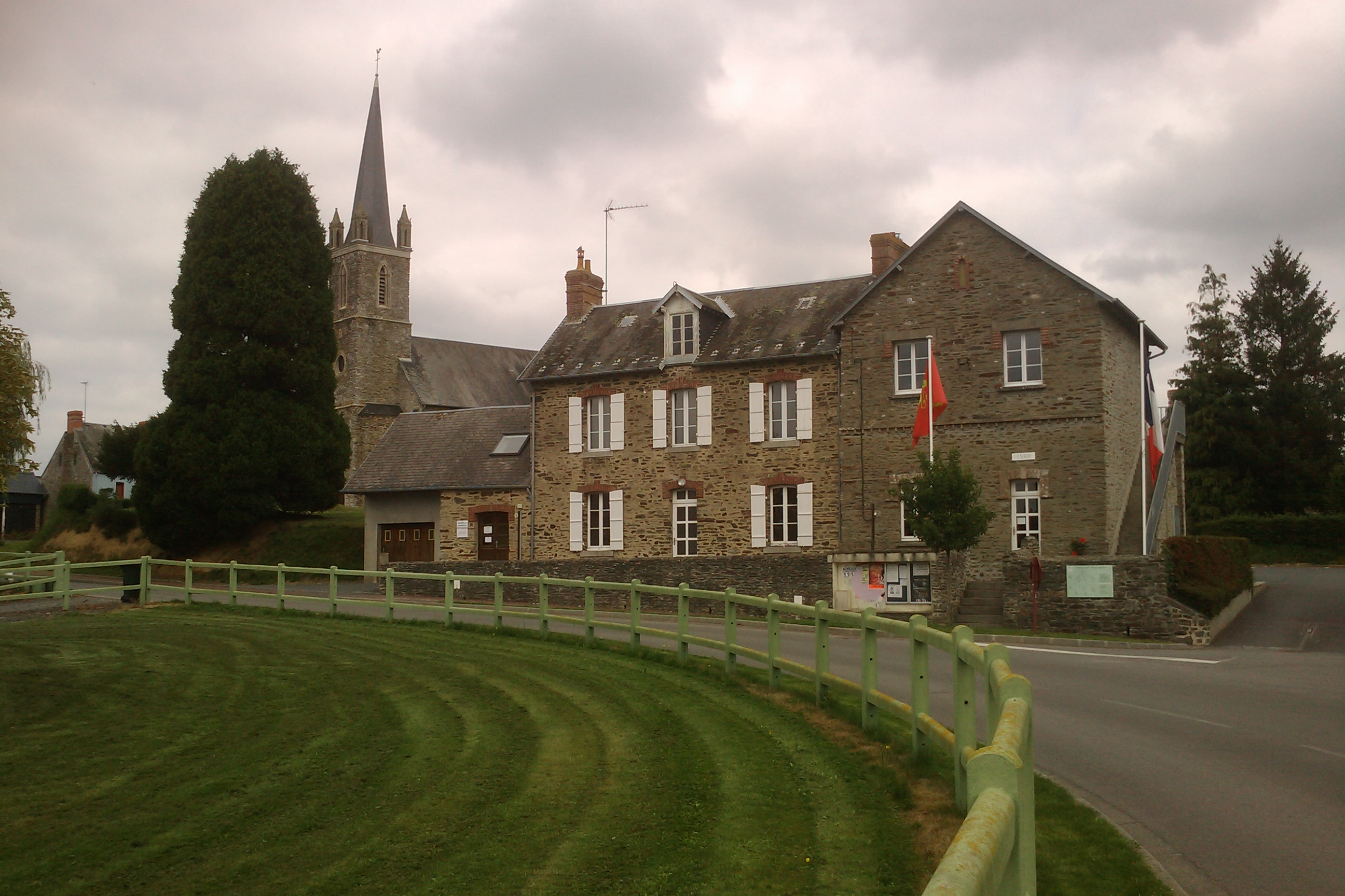 mairie de Baudre en premier plan et son église en second plan